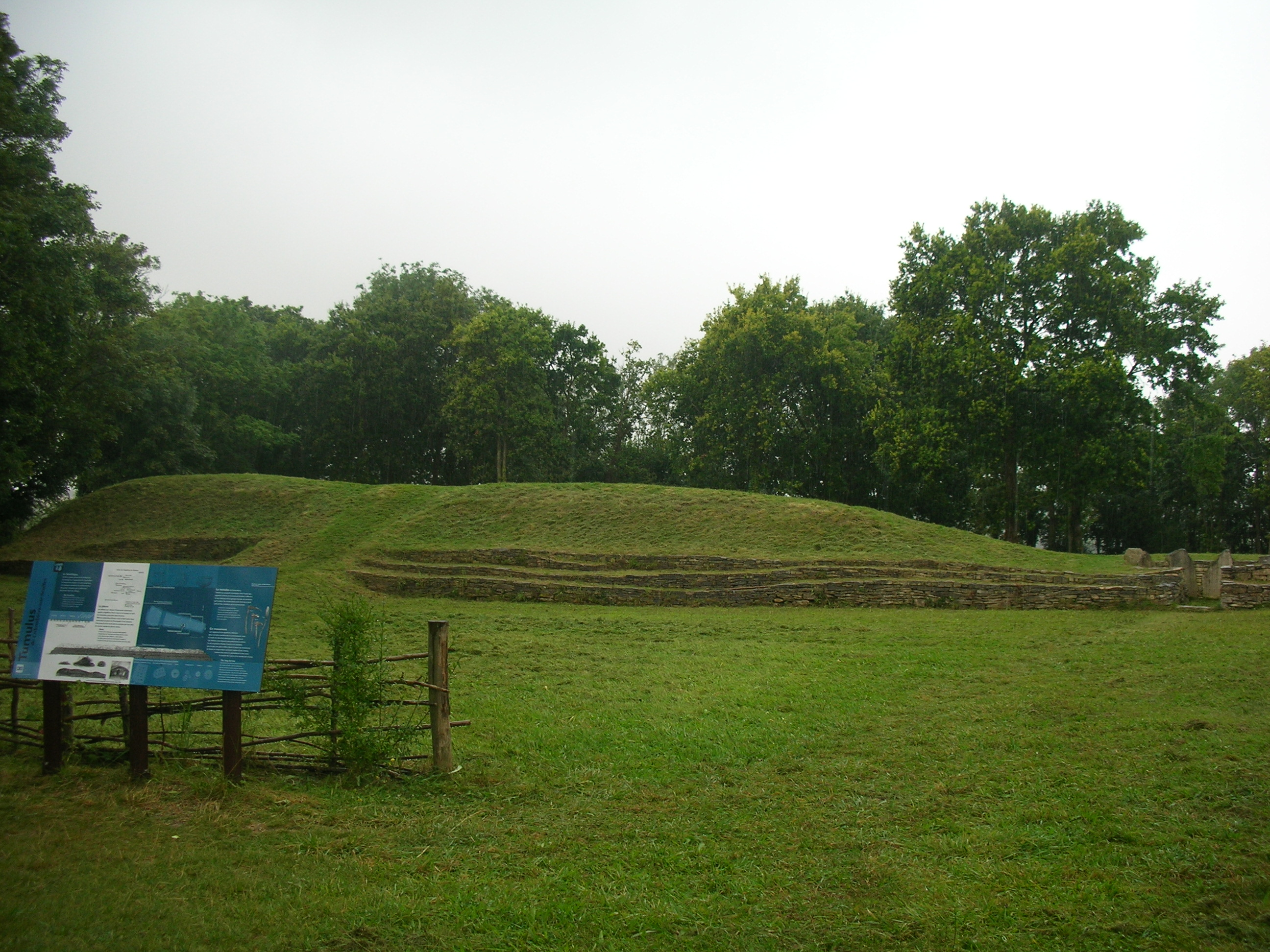 Tumulus in Colombiers-sur-Seulles, Calvados, France ; 4OOO BC.